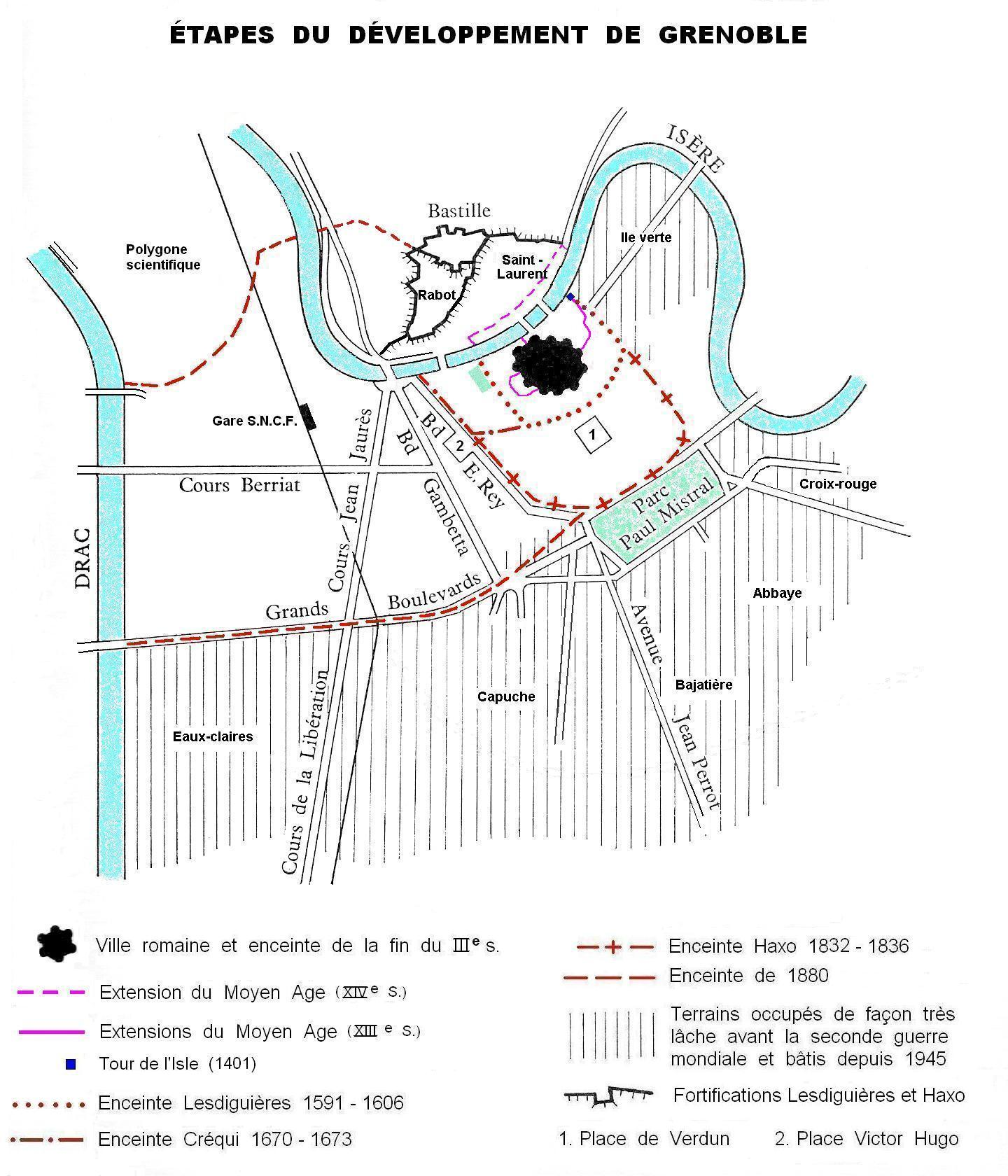 Etapes des fortifications de la ville de Grenoble